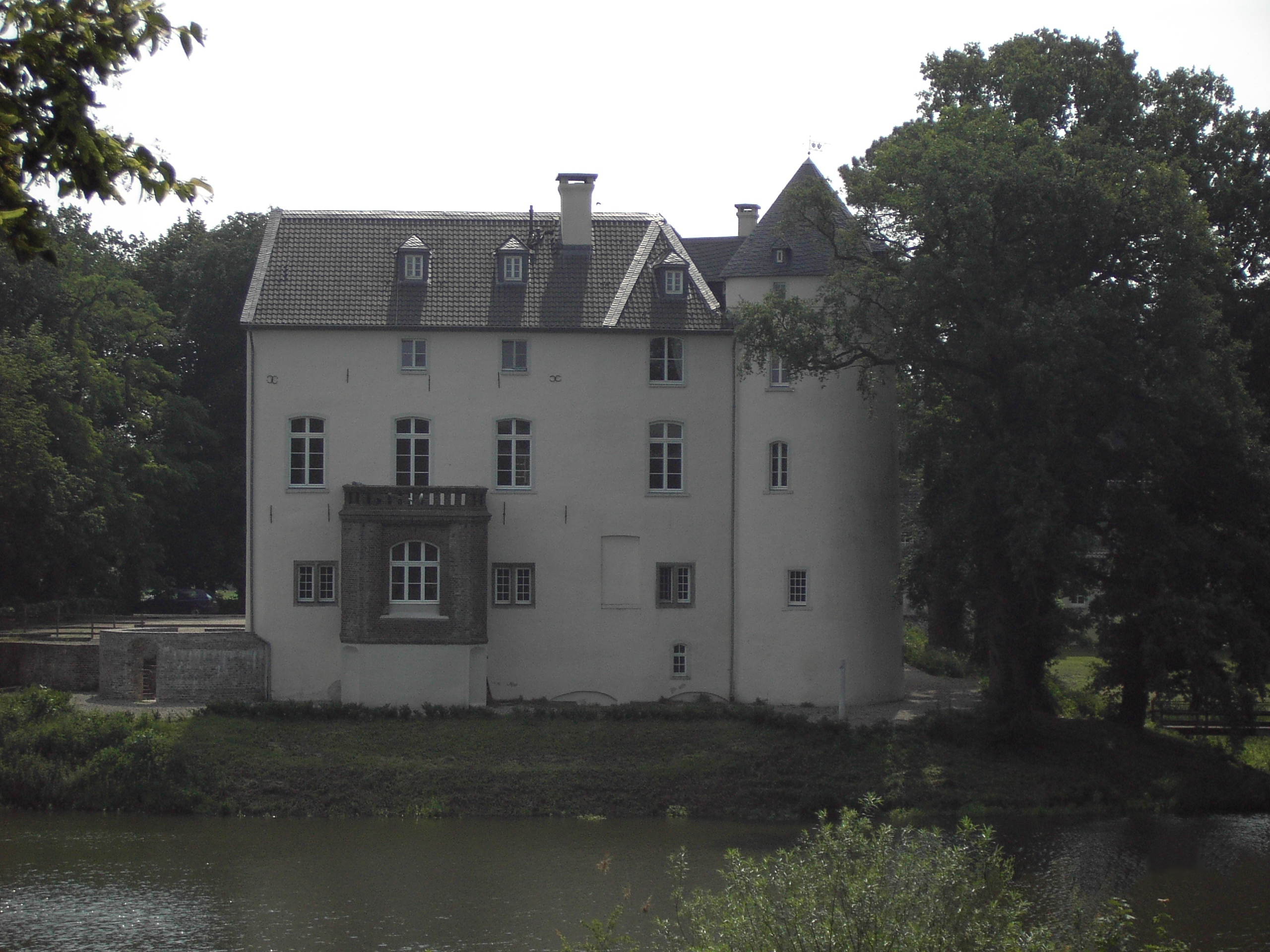 Huis Boetzelaer in D-47546 Kalkar (Zicht uit Noord)